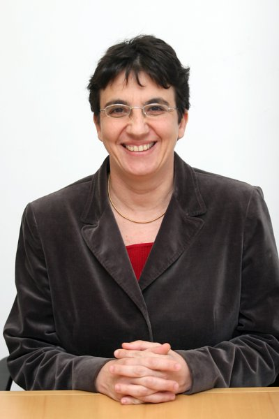 סוניה רוקס